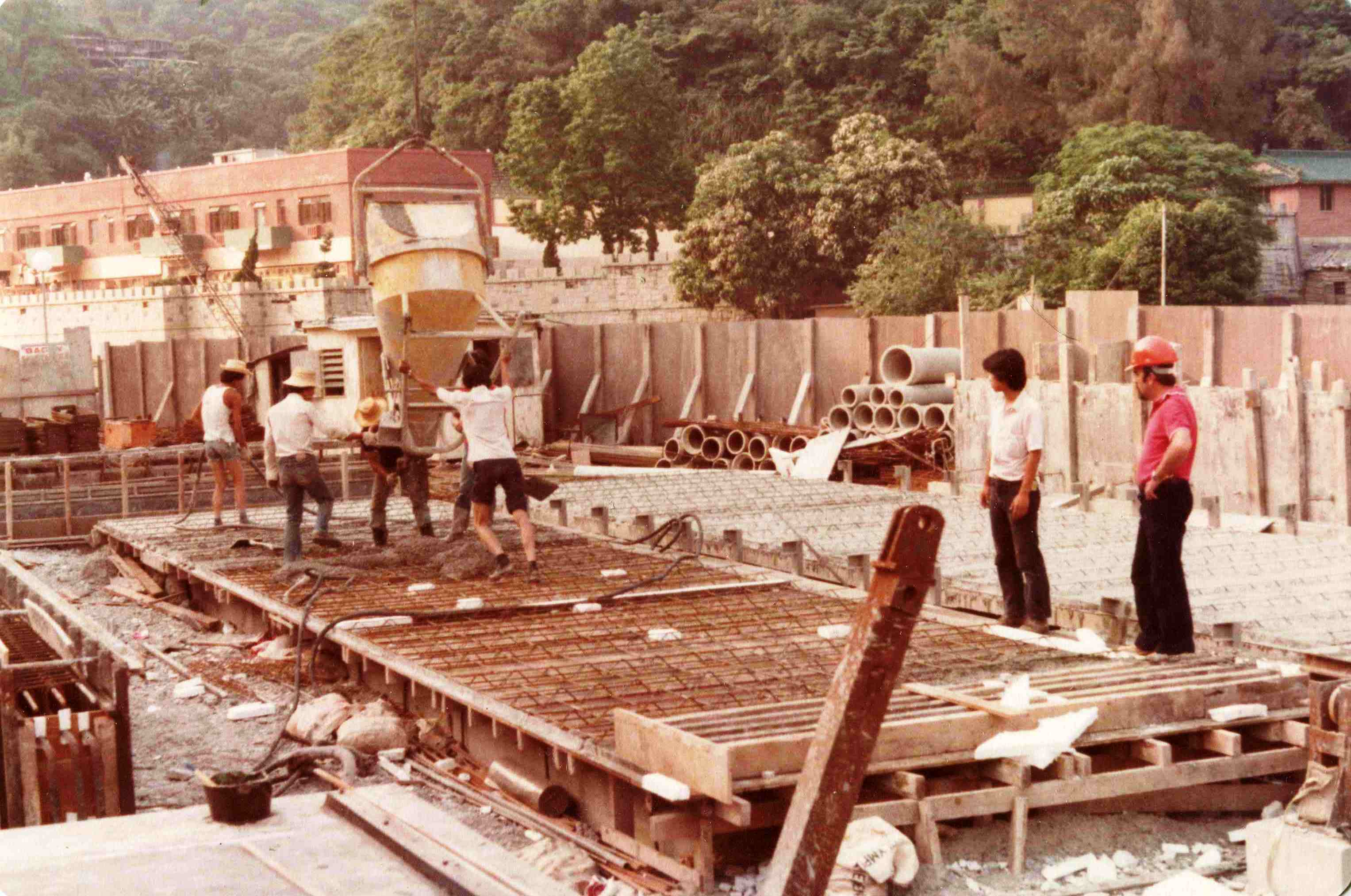 測量師參與香港建築工程。（相片由張順光測量師提供）